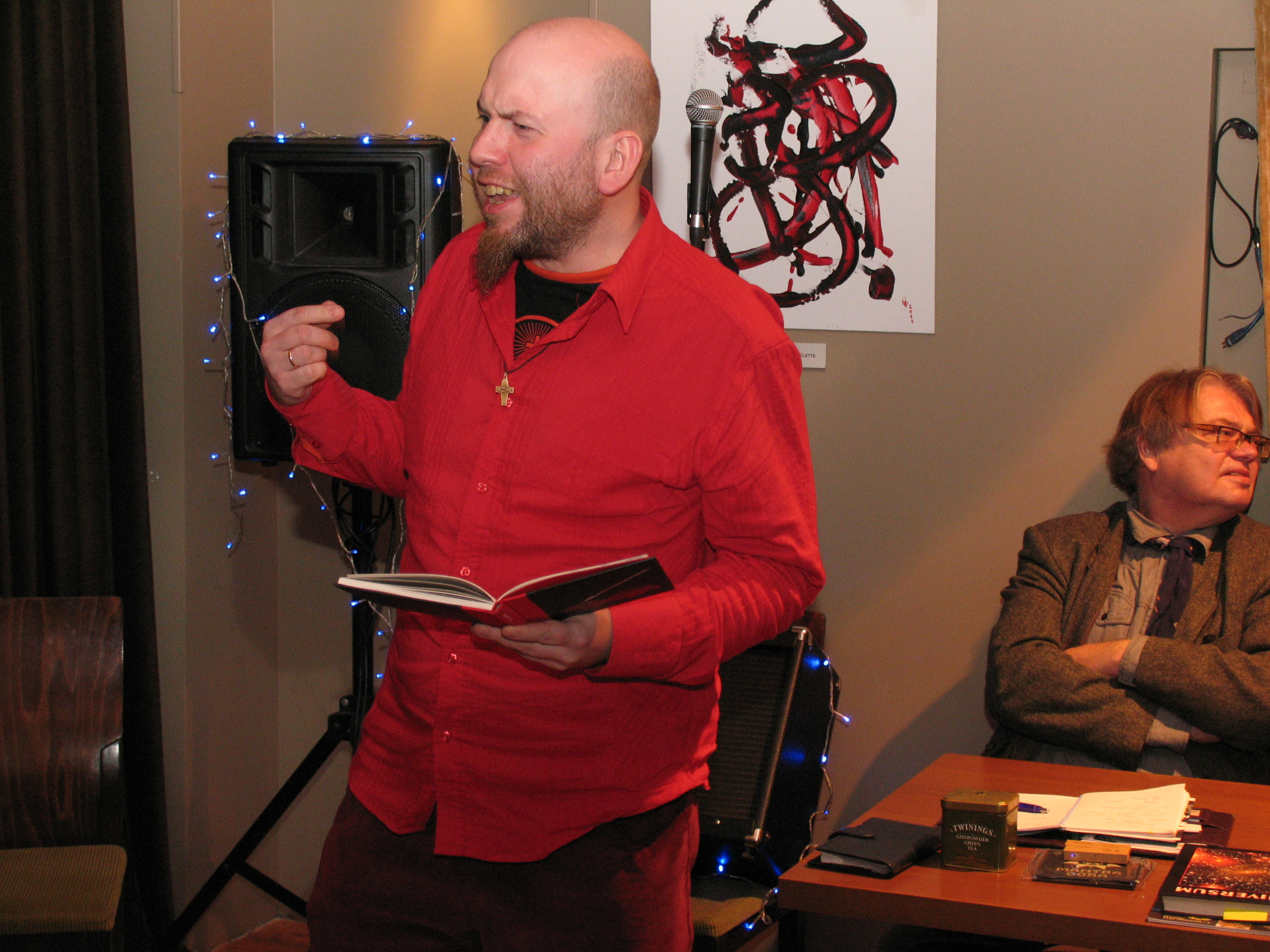 Jürgen Rooste 24. november 2011 Teaduskabareel.